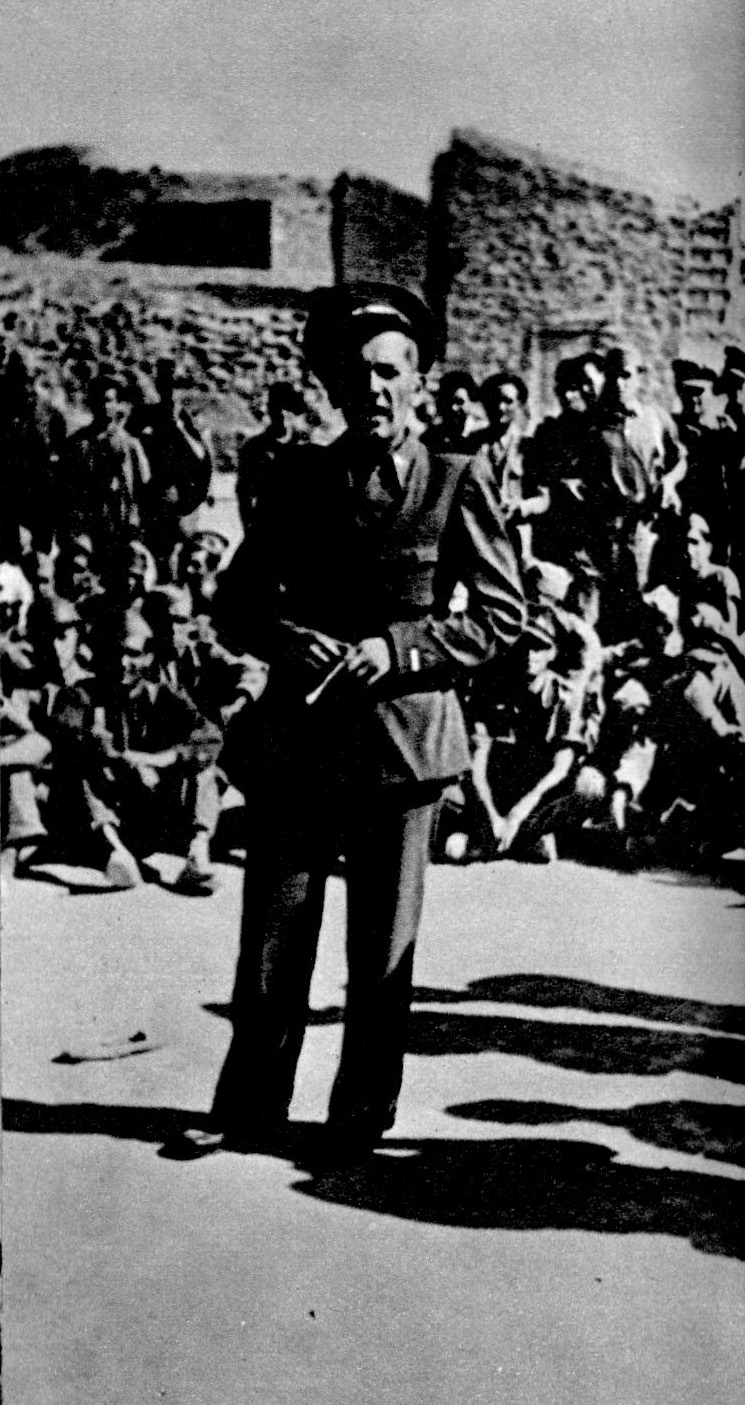 Formiranje 129. brigade. Govori Božidar Maslarić.